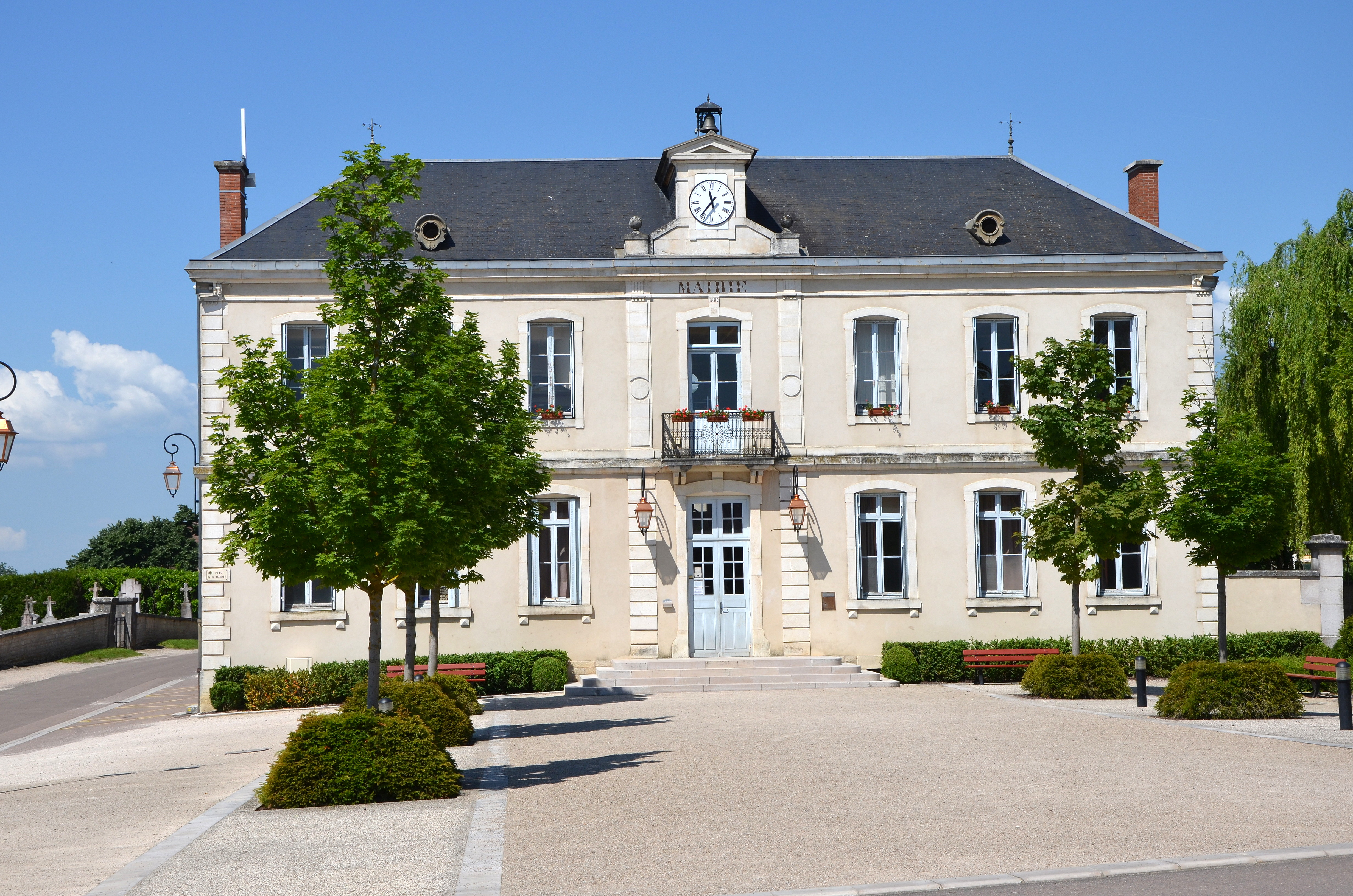 Mairie de Villebichot, Côte d'Or, Bourgogne, France